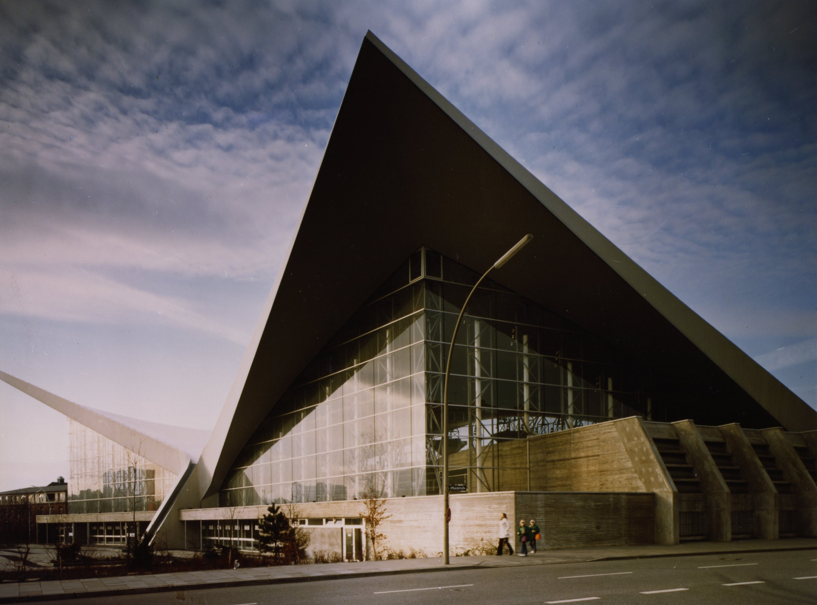 Bildbeschreibung: Hamburg, Alsterschwimmhalle Quelle: Büro Neuhäusser+Schmitt Fotograf/Zeichner: Niessen, Wiesbaden Datum: 1973